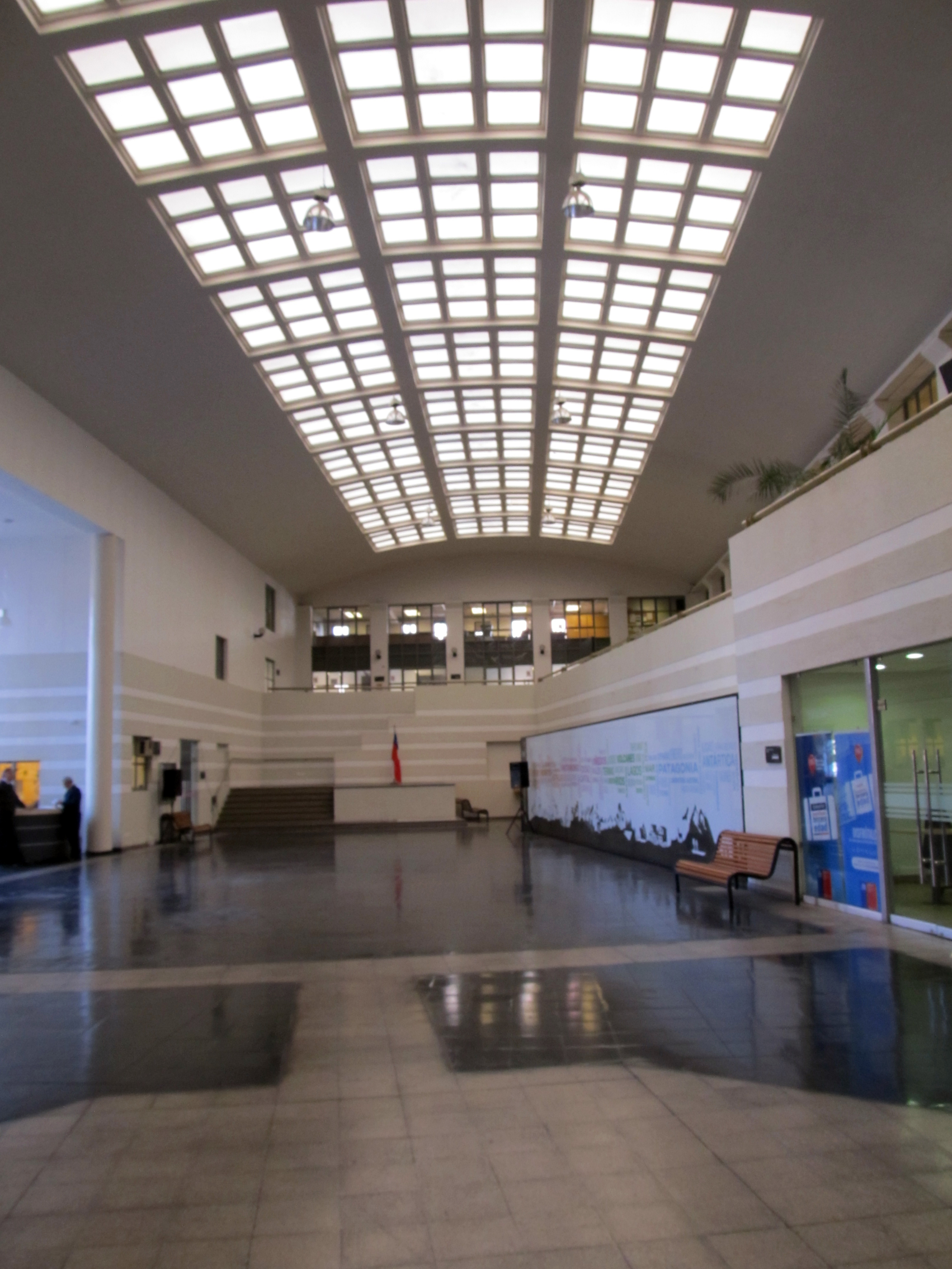 Hall edificio Sernatur, Providencia, Santiago, Chile.